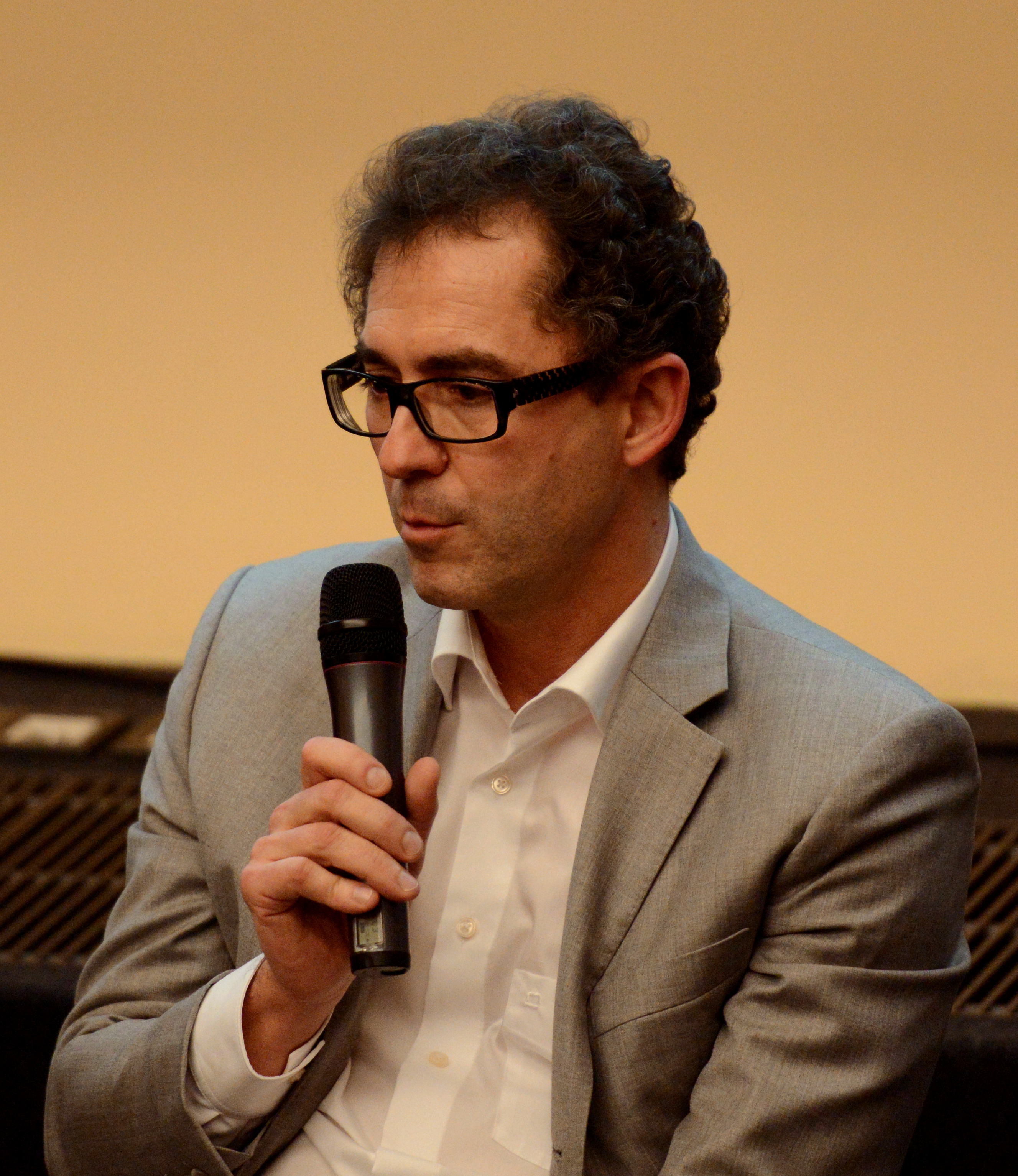 Den Historiker Michel Polfer, Direkter vum Nationalmusée intervenéiert bei der Table ronde Le milieu culturel luxembourgeois sous l'Occupation allemande, 28. Januar 2014 am Auditoire vum Cité.